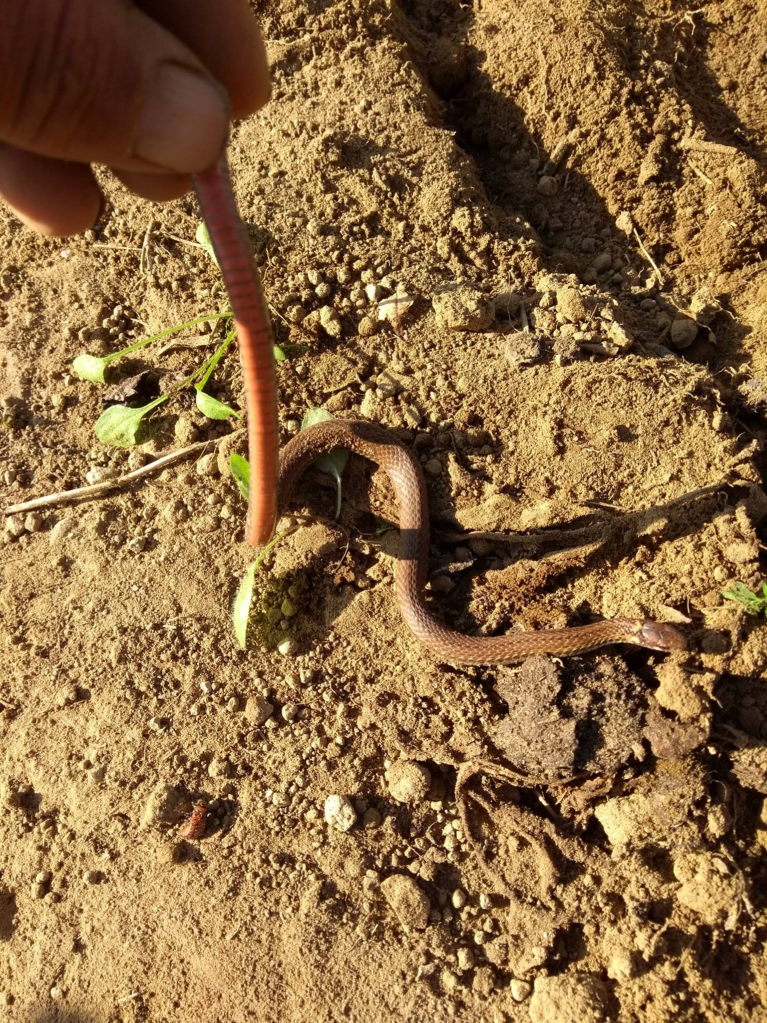 Couleuvre à ventre rouge. Aucune couleuvre n'a été maltraitée pour la photo